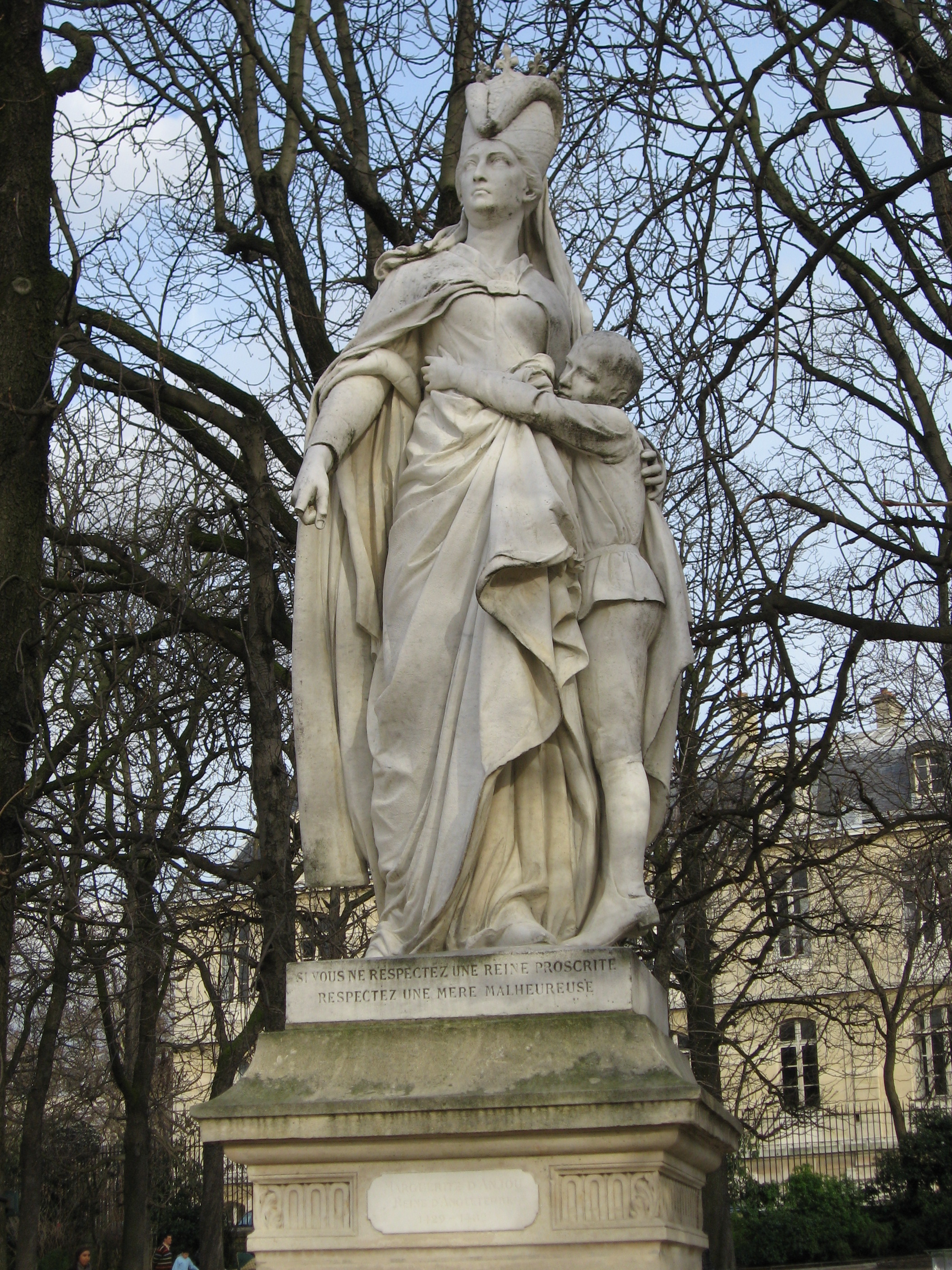 Ferdinand Taluet (français 1820 Angers - 1904 Paris): Marguerite d'Anjou, Reine d'Angleterre (1429-1482), groupe sculpté en pied (signé et daté 1895, salon de 1895), marbre, Paris, Jardin du Luxembourg.